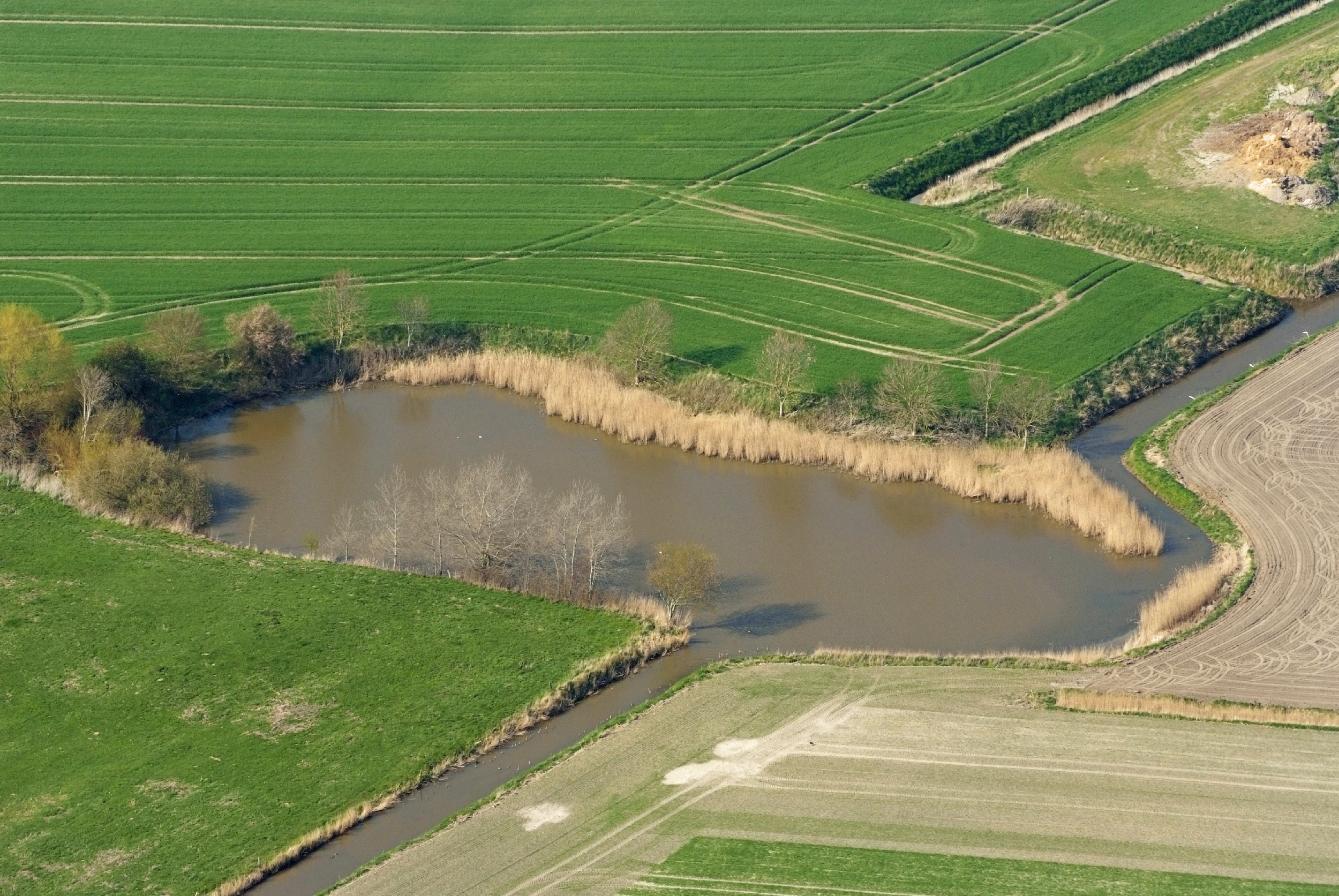 Kolk und der Entwässerungsgraben Schoonorther Polderschloot in Schoonorth in der nördlichen Krummhörn. Der Graben verläuft entlang einer alten Deichlinie.